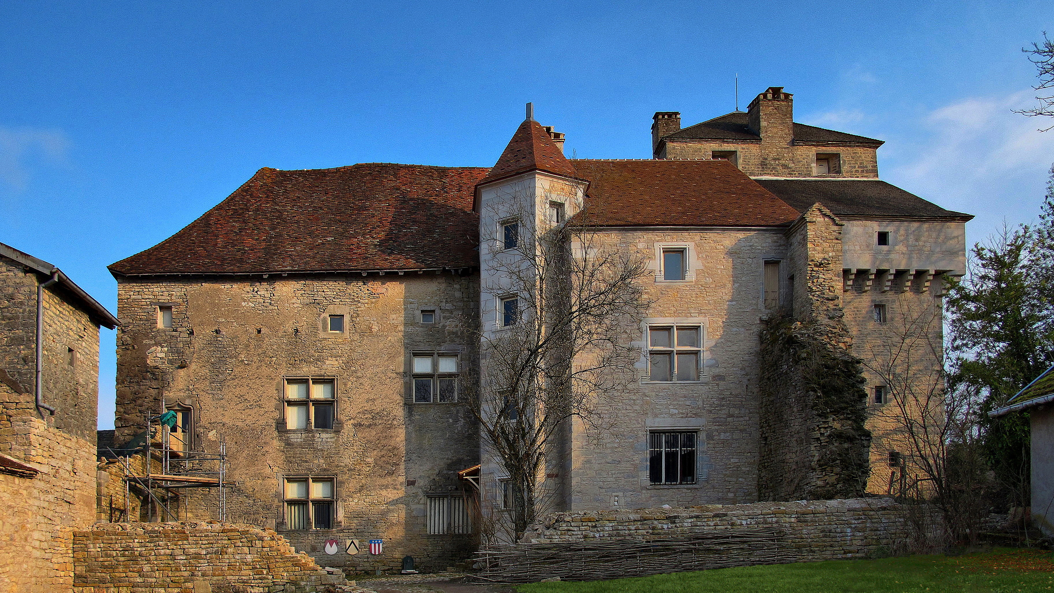 Inscrit aux monuments historiques sous le numéro PA00102281